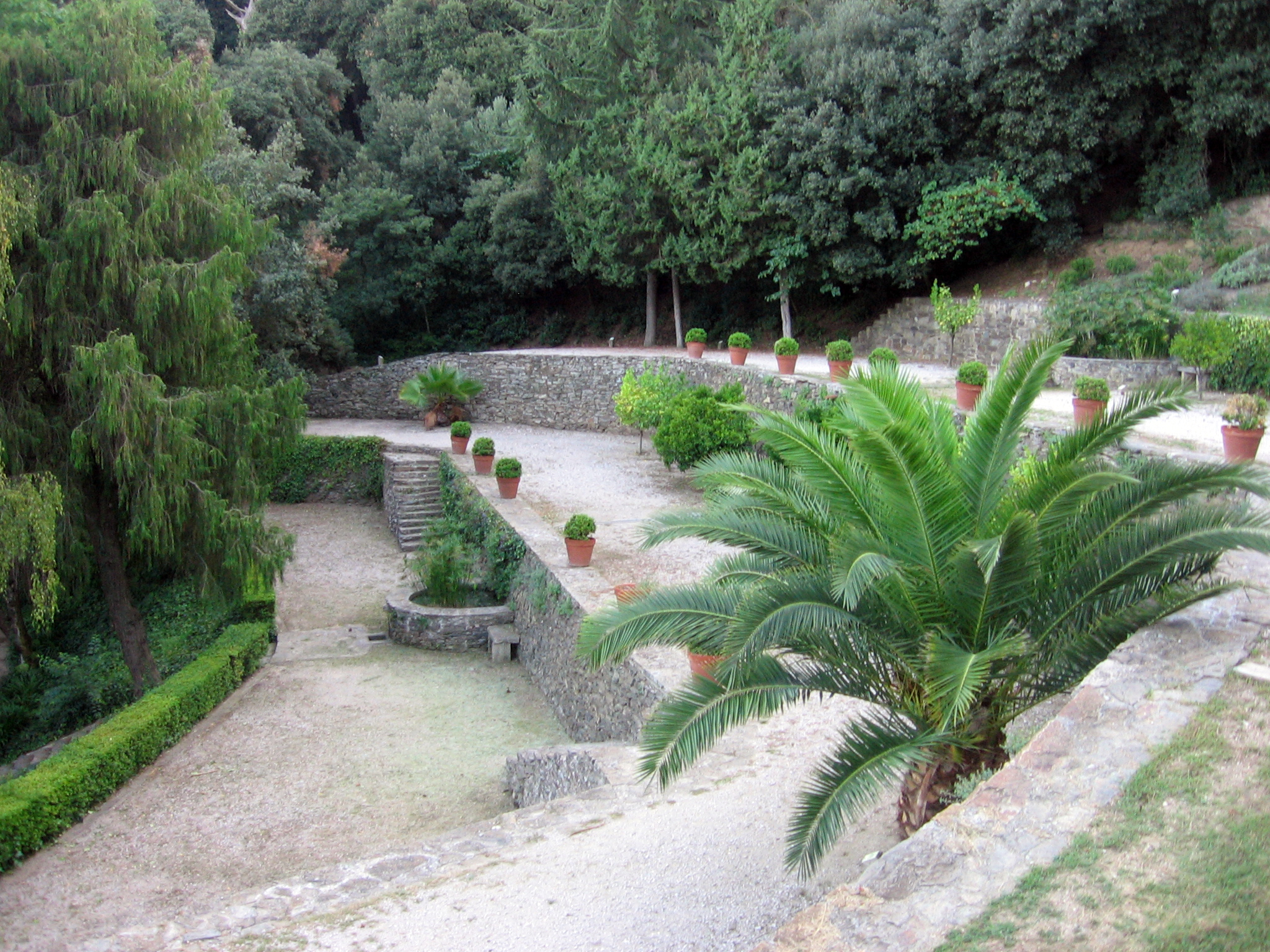 Vivero de Can Borni